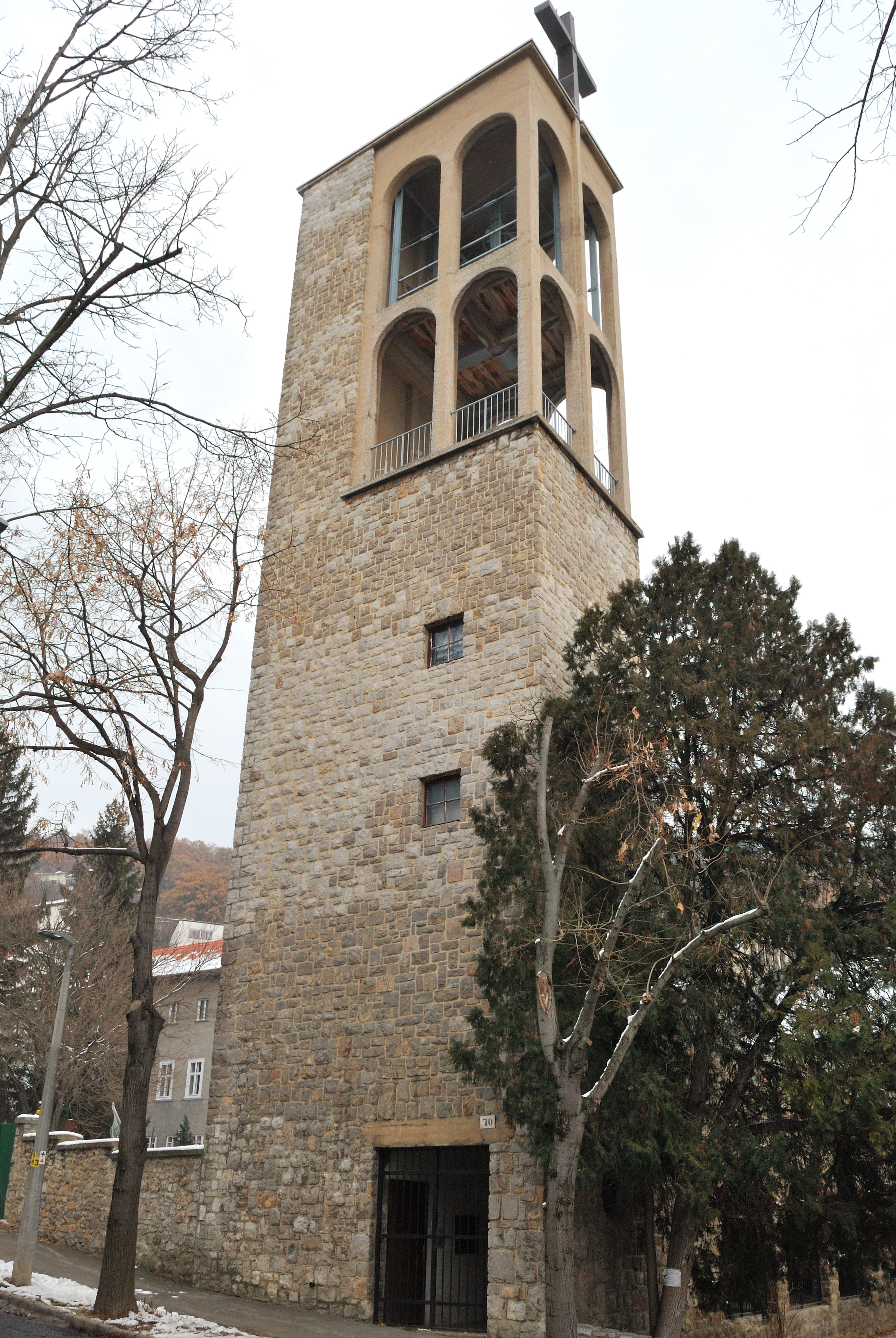 Pécsi pálos templom harangtornya